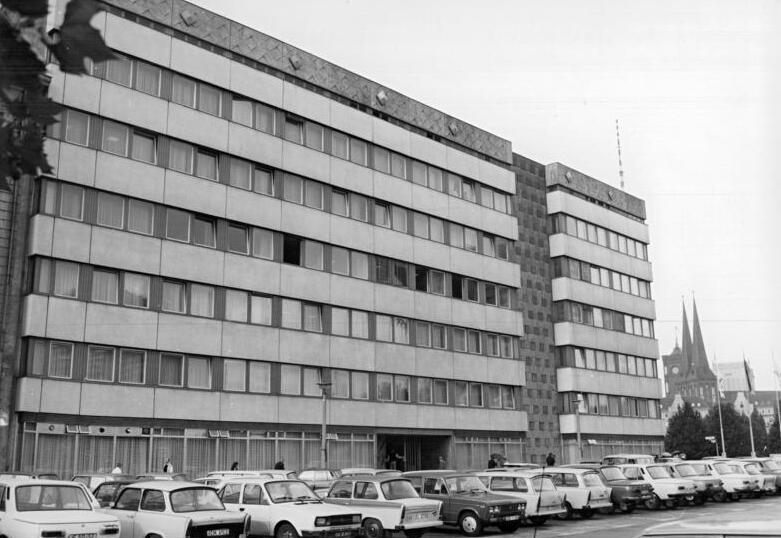 Berlin, Ministerium für Bauwesen ADN-ZB Junge 19.10.87 Berlin: Ministerium für Bauwesen.